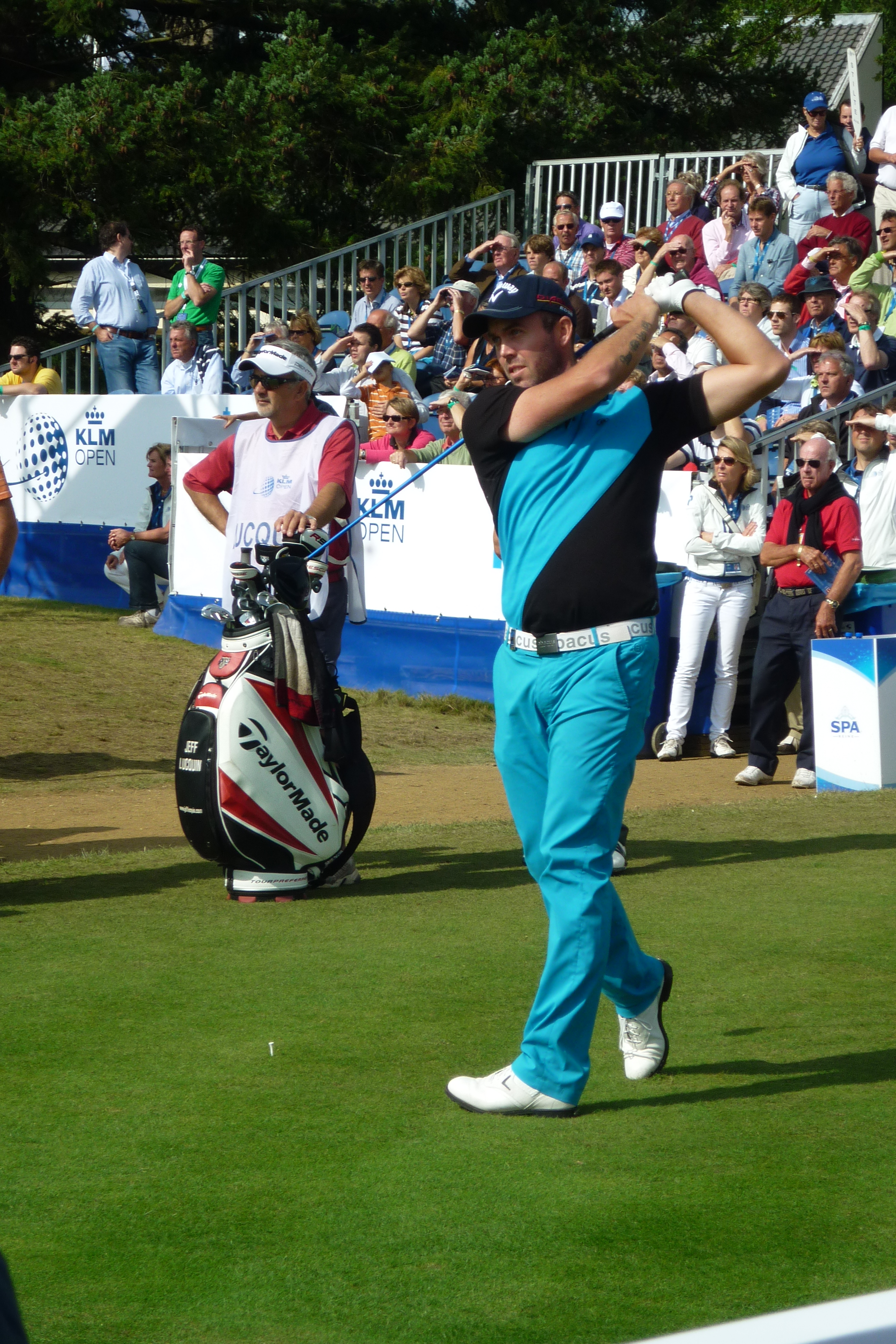 Christian Nilsson op KLM Open 2010